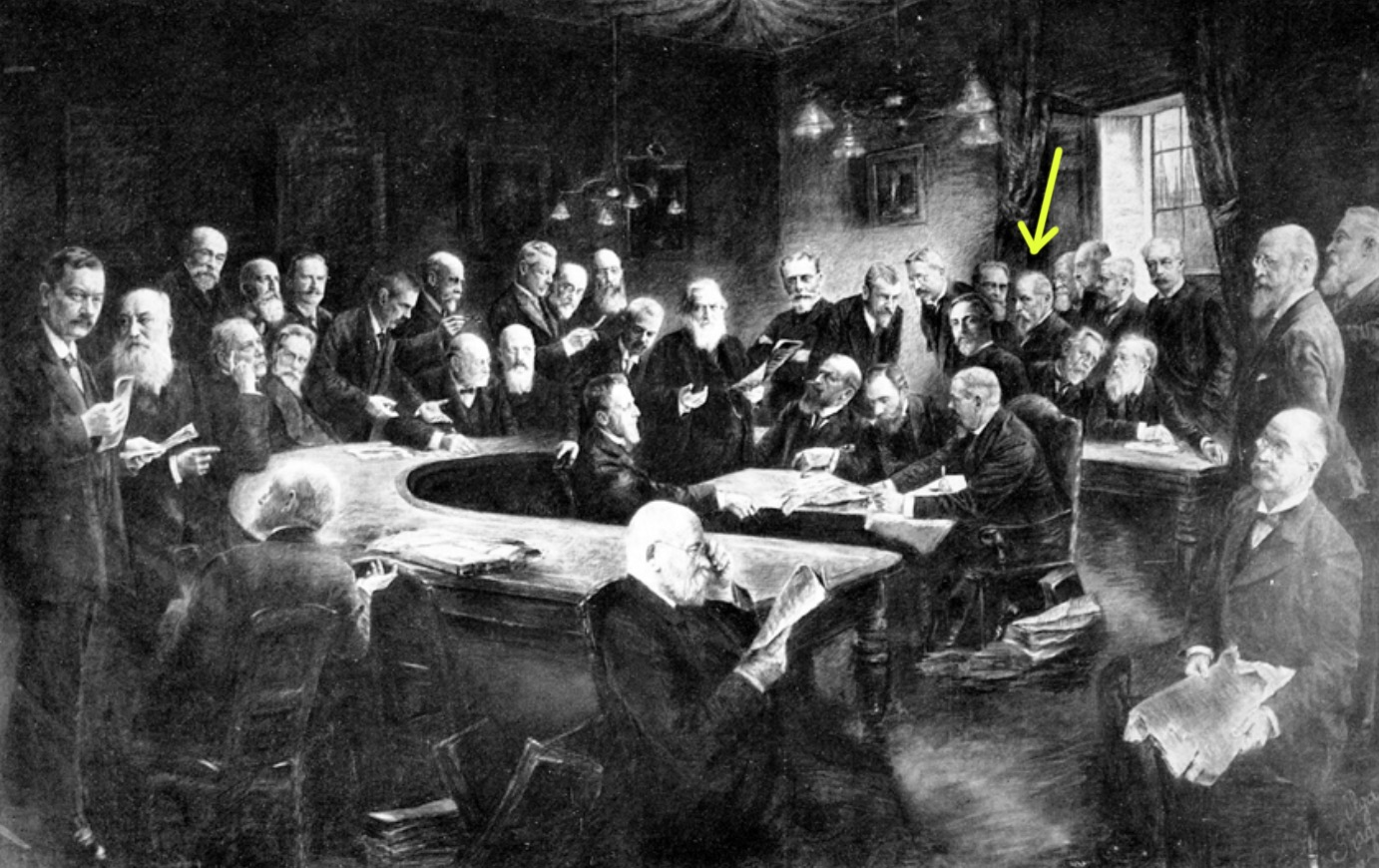 Leopold Oser markiert (modified by Partynia) im Professorenkollegium der medizinischen Universität Wien 1908–1910